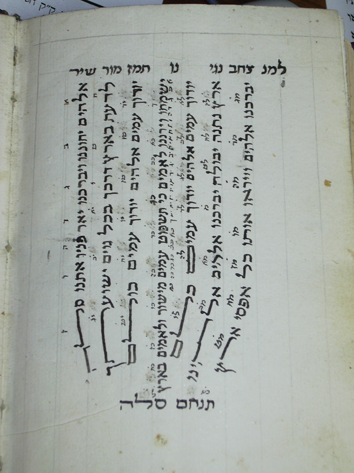 למנצח כתב יד השמן ששון